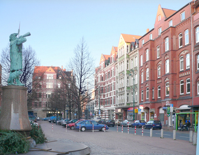 Lindener Marktplatz, Hannover